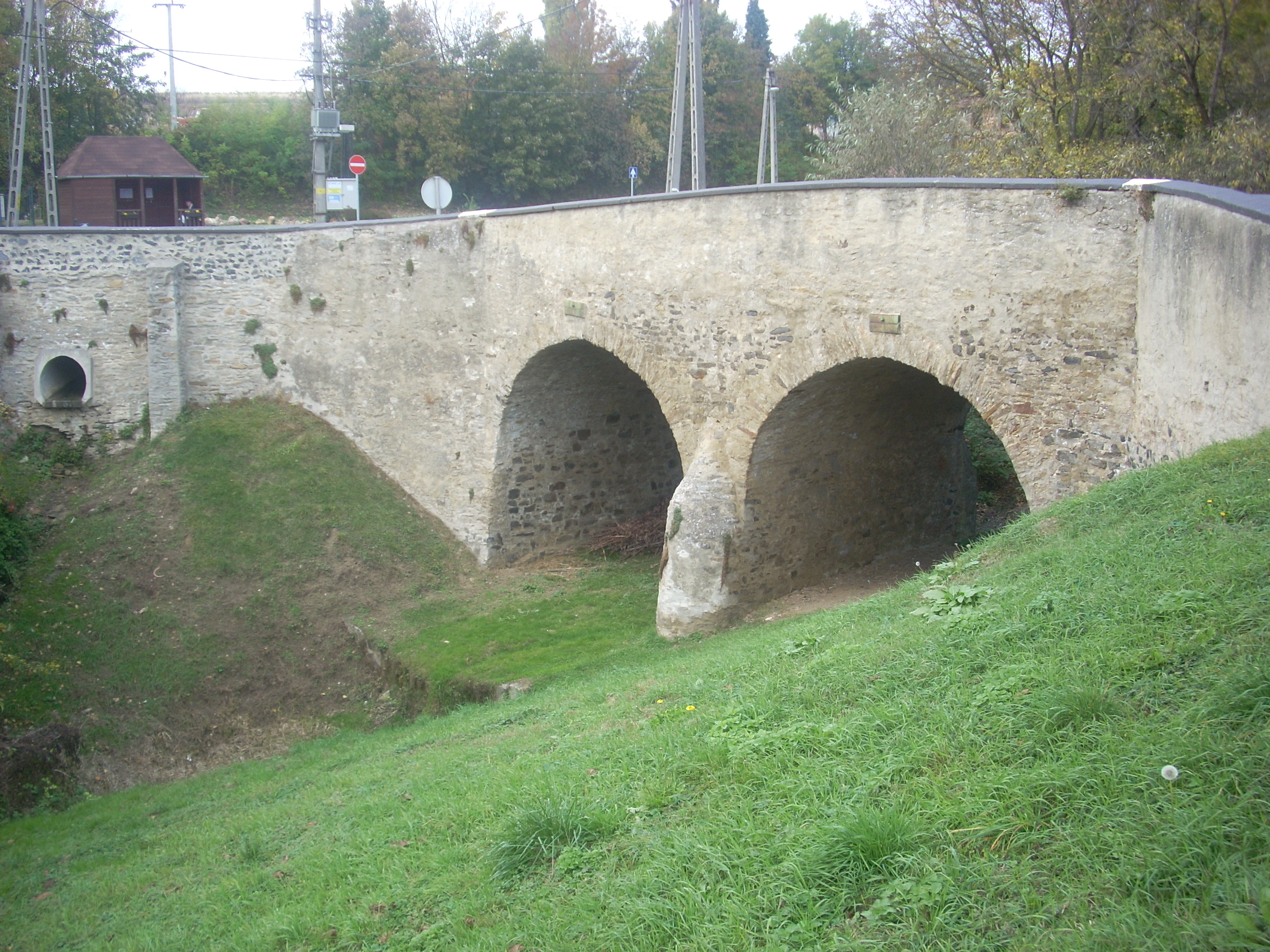 Nemesbüki híd